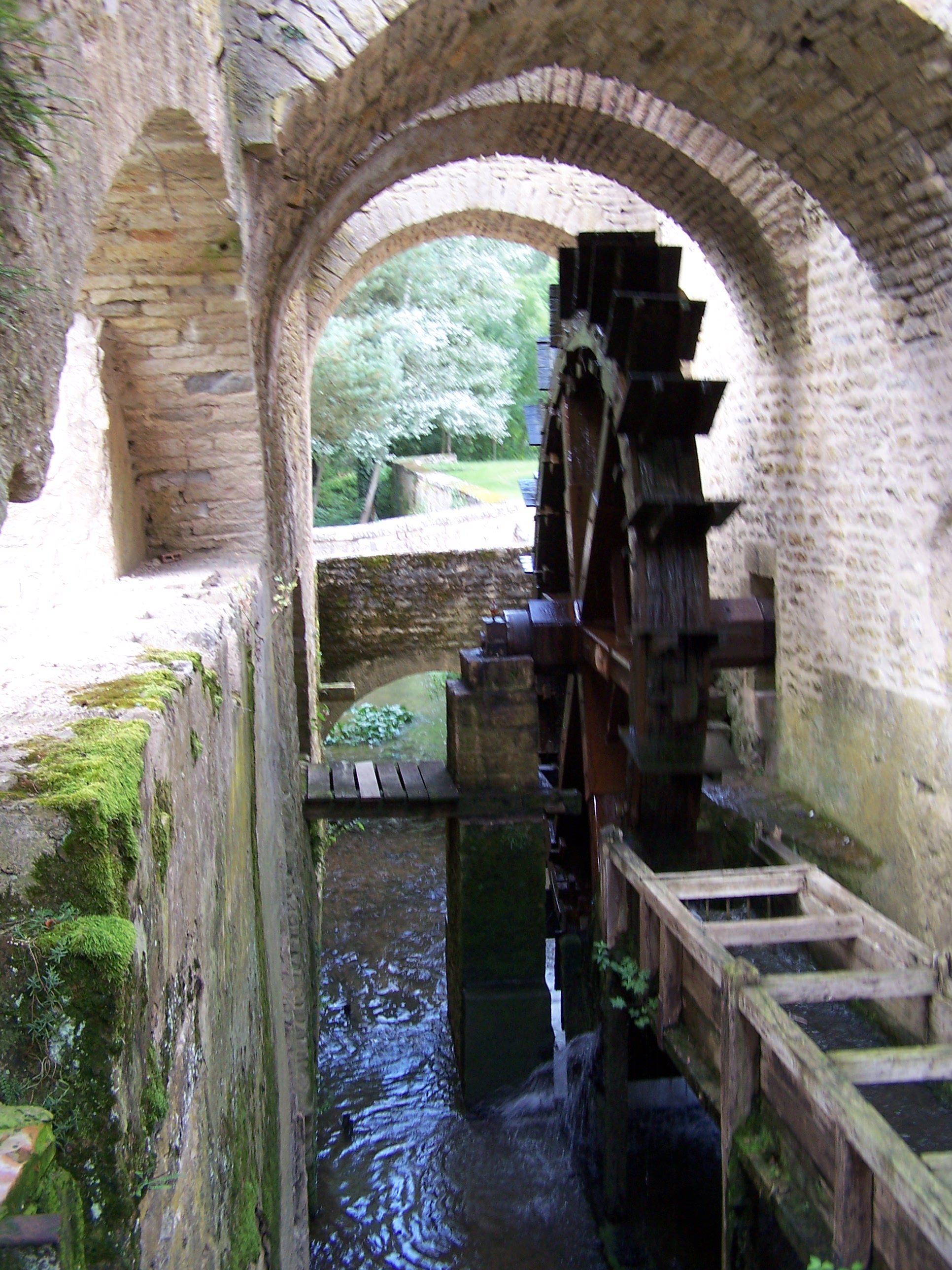 Forges de Buffon. Roue à aubes sur le chenal amenant l'eau de l'Armançon.